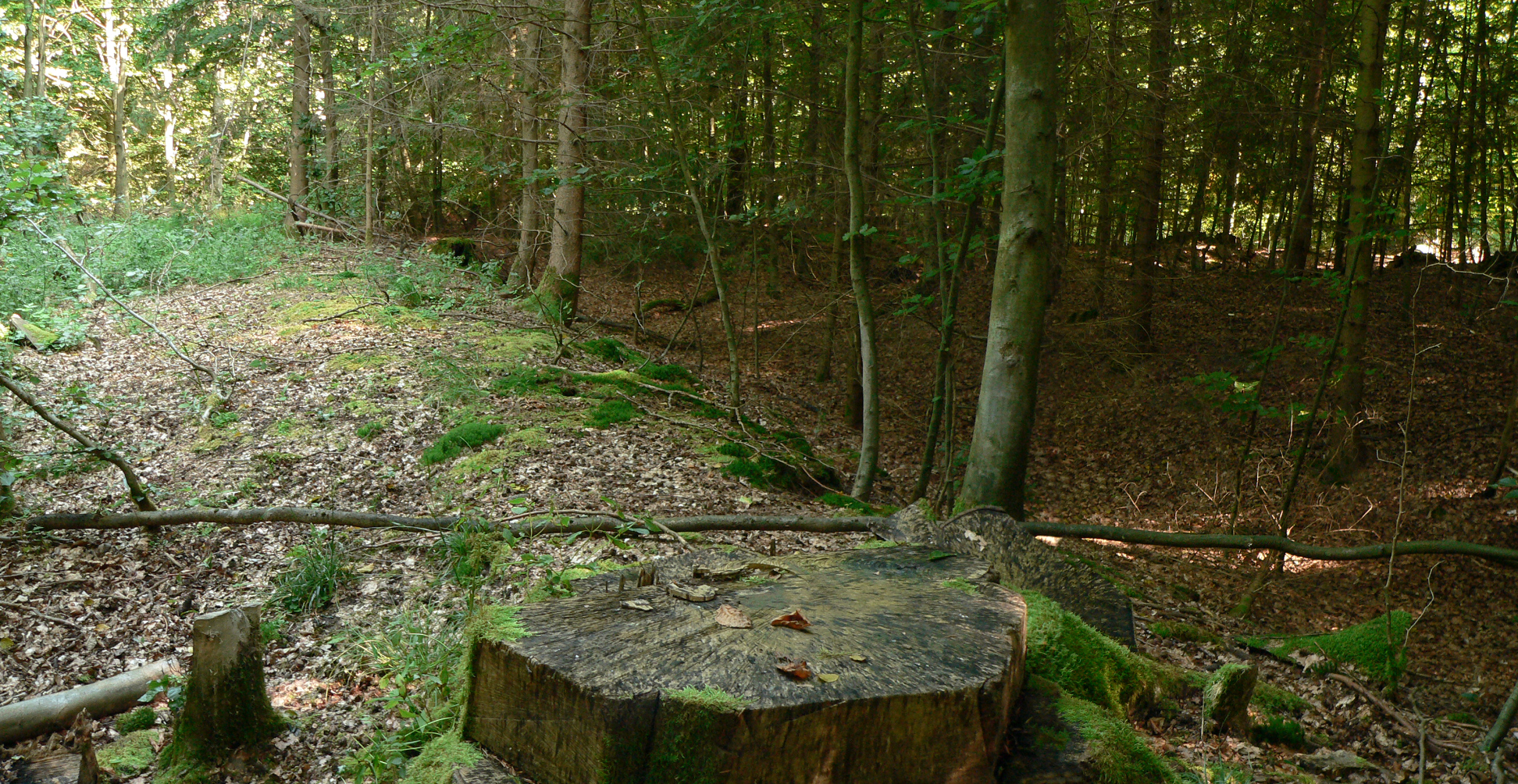 Wall-Grabenanlage Iseshusen, Wall und Graben Nordseite